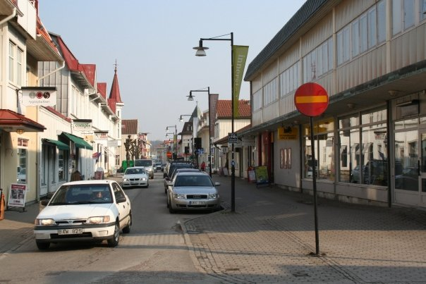 Kungsbacka in Halland, Sweden.